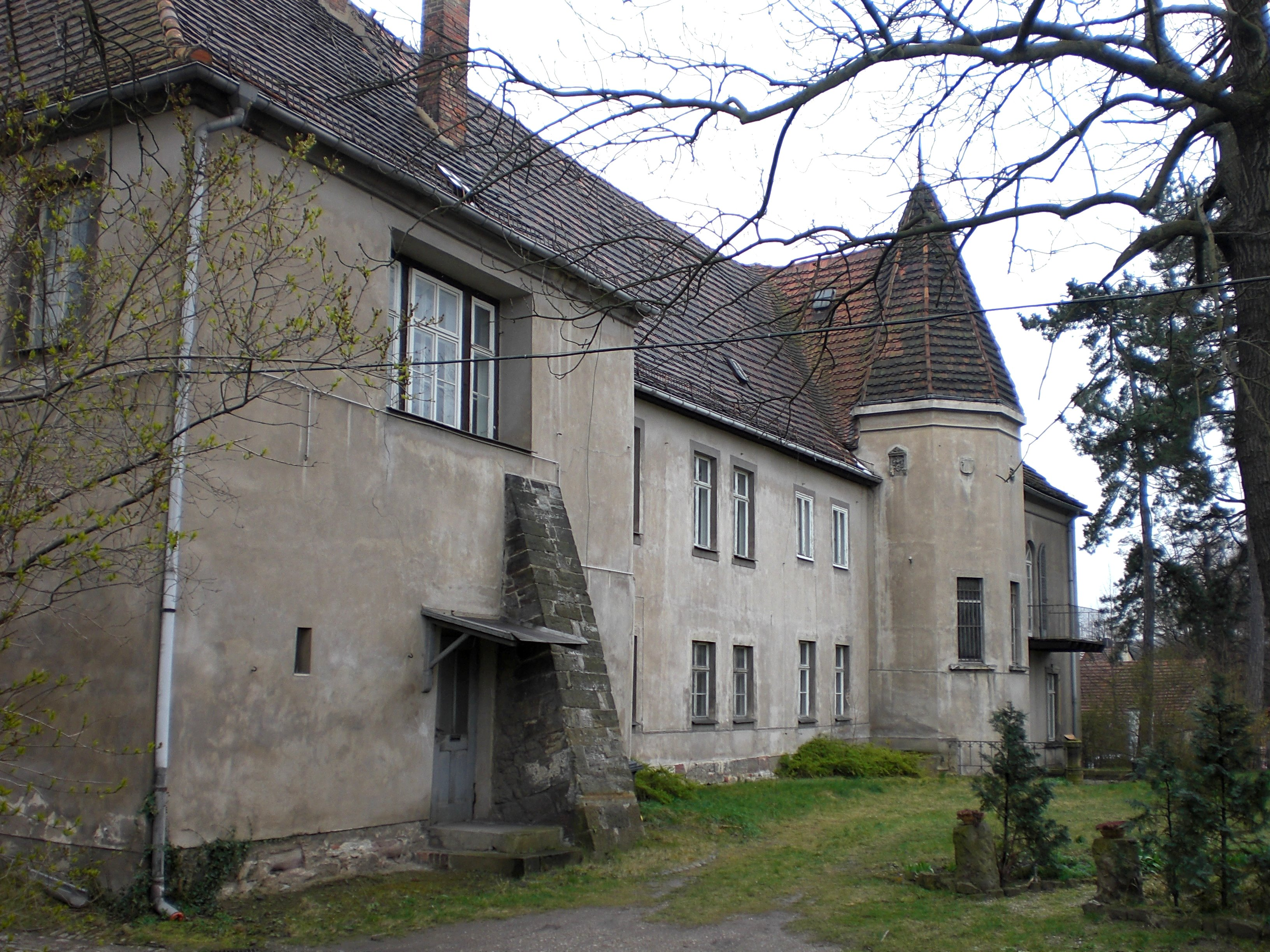 Rückseite der Ägidienkurie, Naumburg, Sachsen-Anhalt